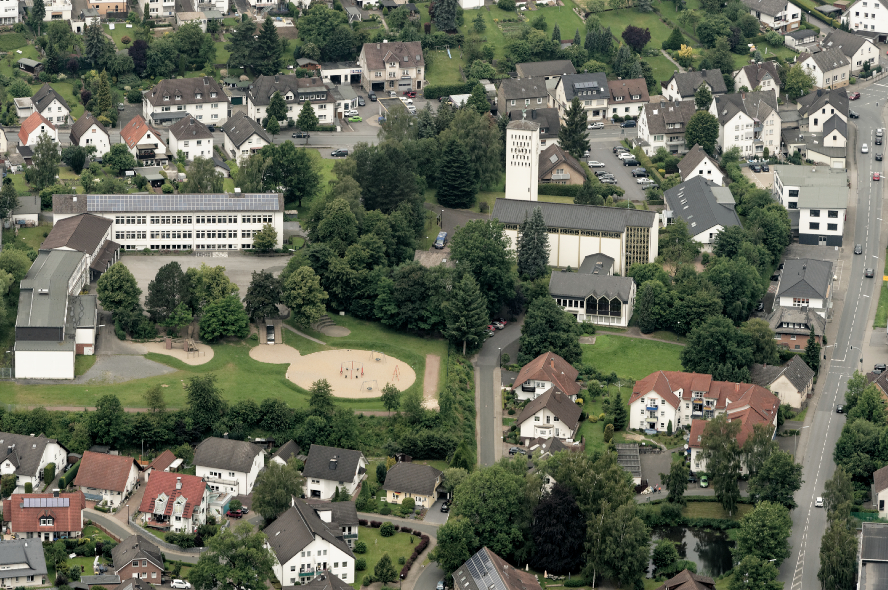 Fotoflug Sauerland Nord. Sundern (Sauerland): Mariengrundschule und Christkönigkirche, Landesstra0e 519, Blickrichtung Nordwest The making of this document was supported by the Community-Budget of Wikimedia Germany.